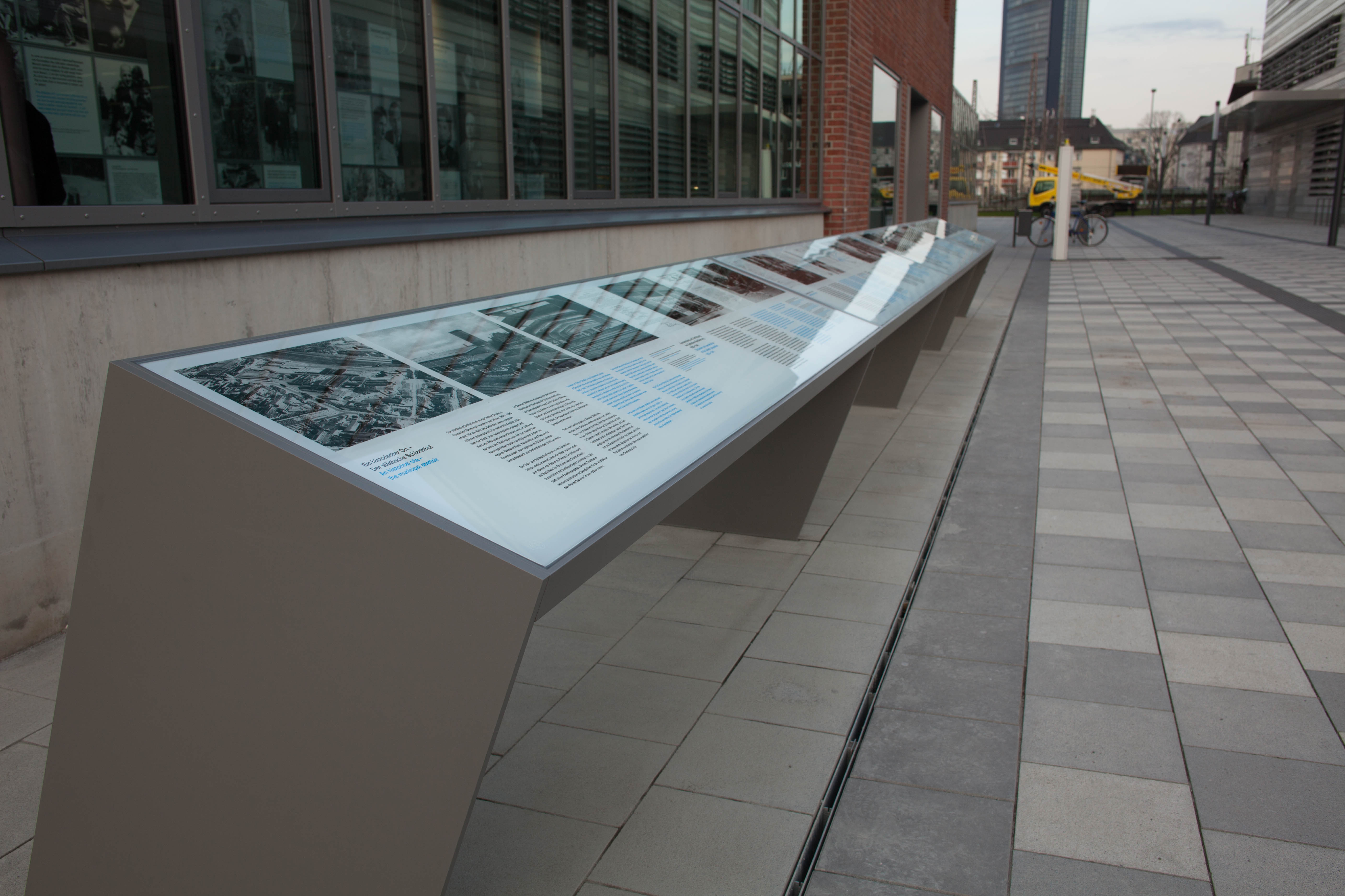 Gedenktafeln zu den Opfern in Zeiten des Nationalsozialismus, die vom Alten Schlachthof Düsseldorf deportiert wurden.